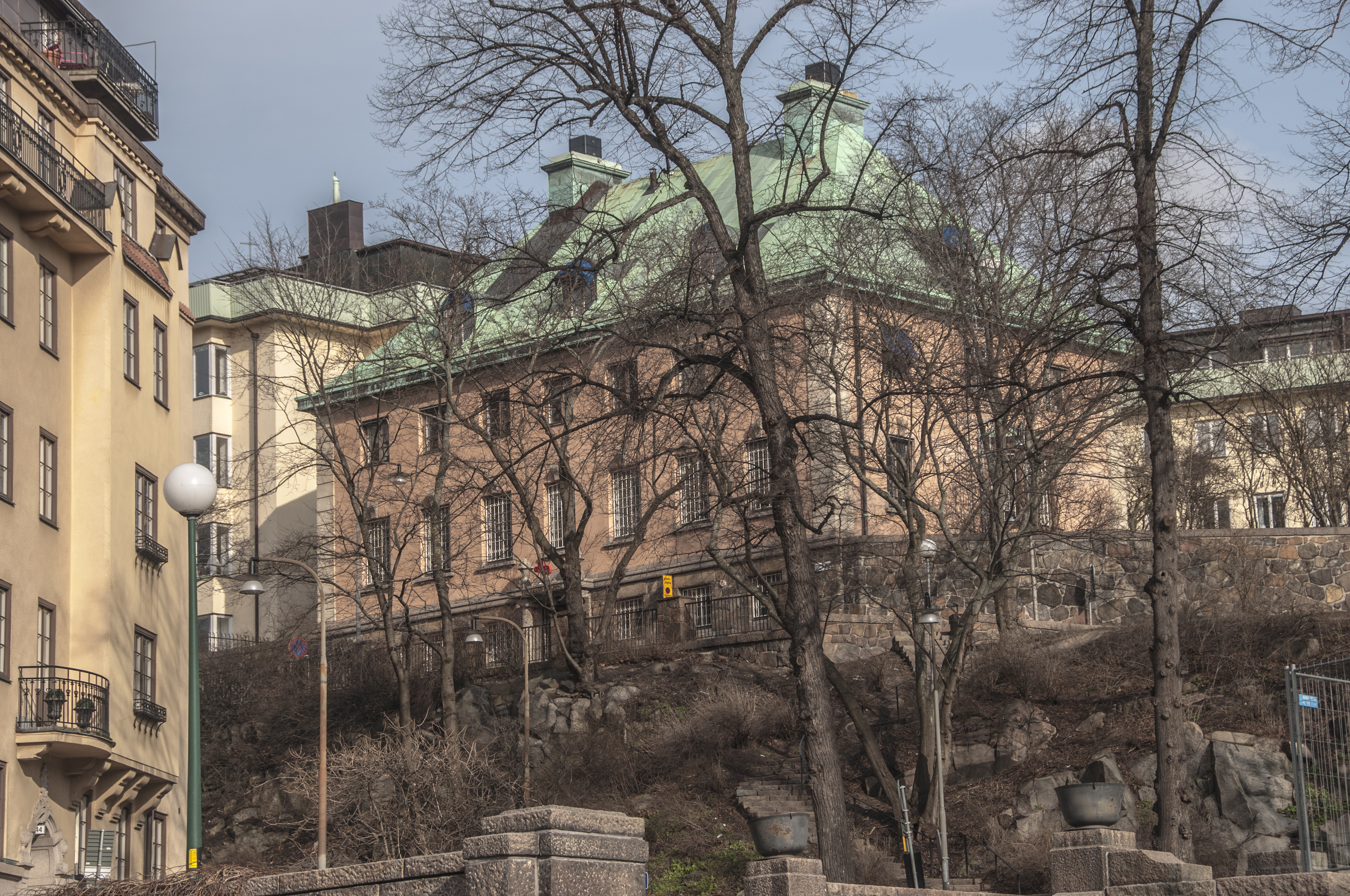 Schneidlerska villan, Eriksbergsgatan 27, Nybyggnadsår 1922 - 1925, A. Holmgren (Byggmästare) John Bagger (Arkitekt) Timmermansorden (Byggherre)